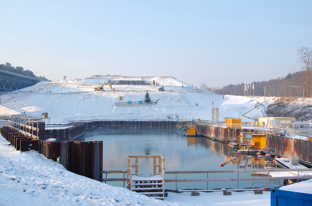 Baustelle des Schiffshebewerks Niederfinow Nord am Oder-Havel-Kanal in Brandenburg, Deutschland